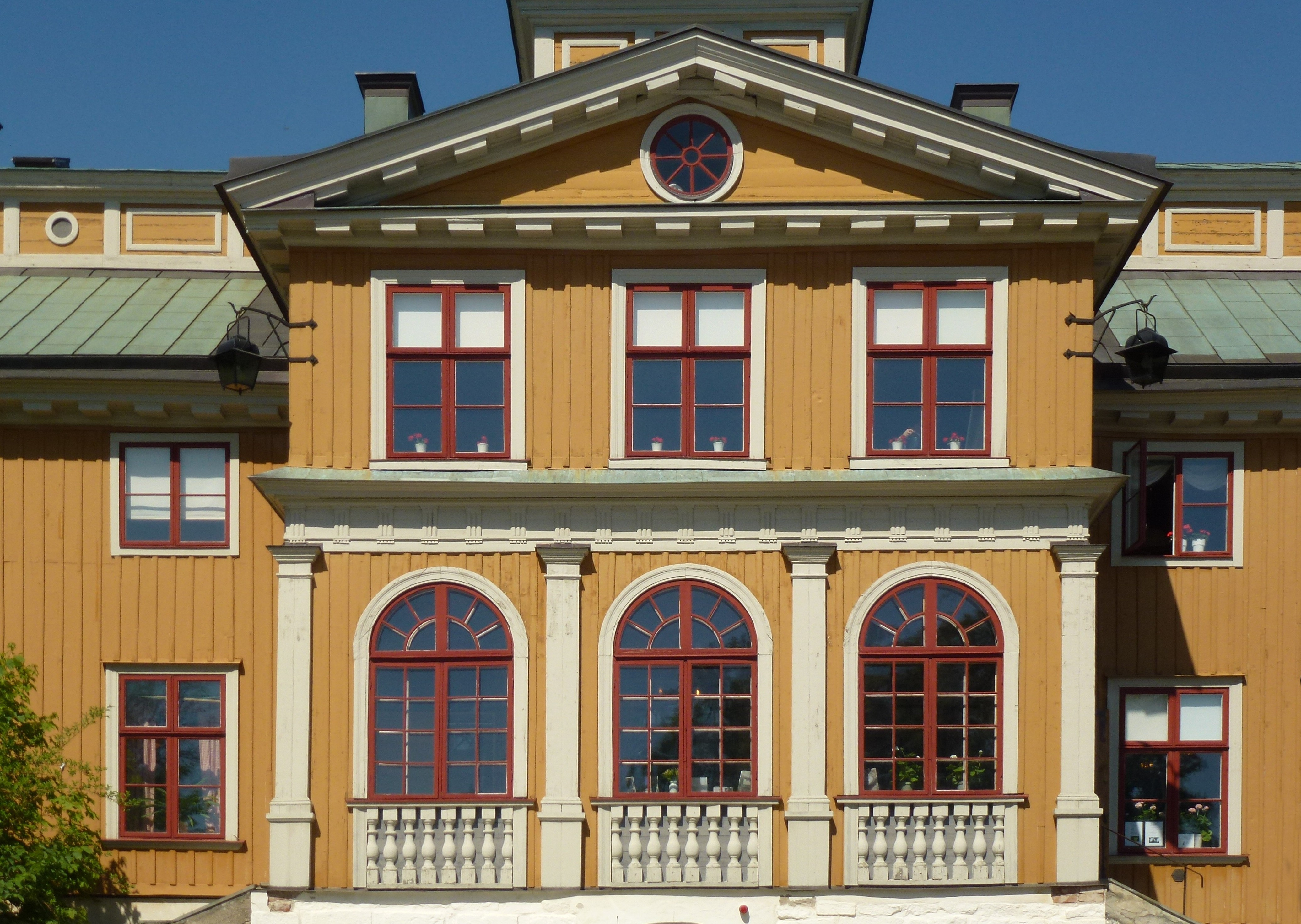 Ekebyhovs slott sydsida, frontespis